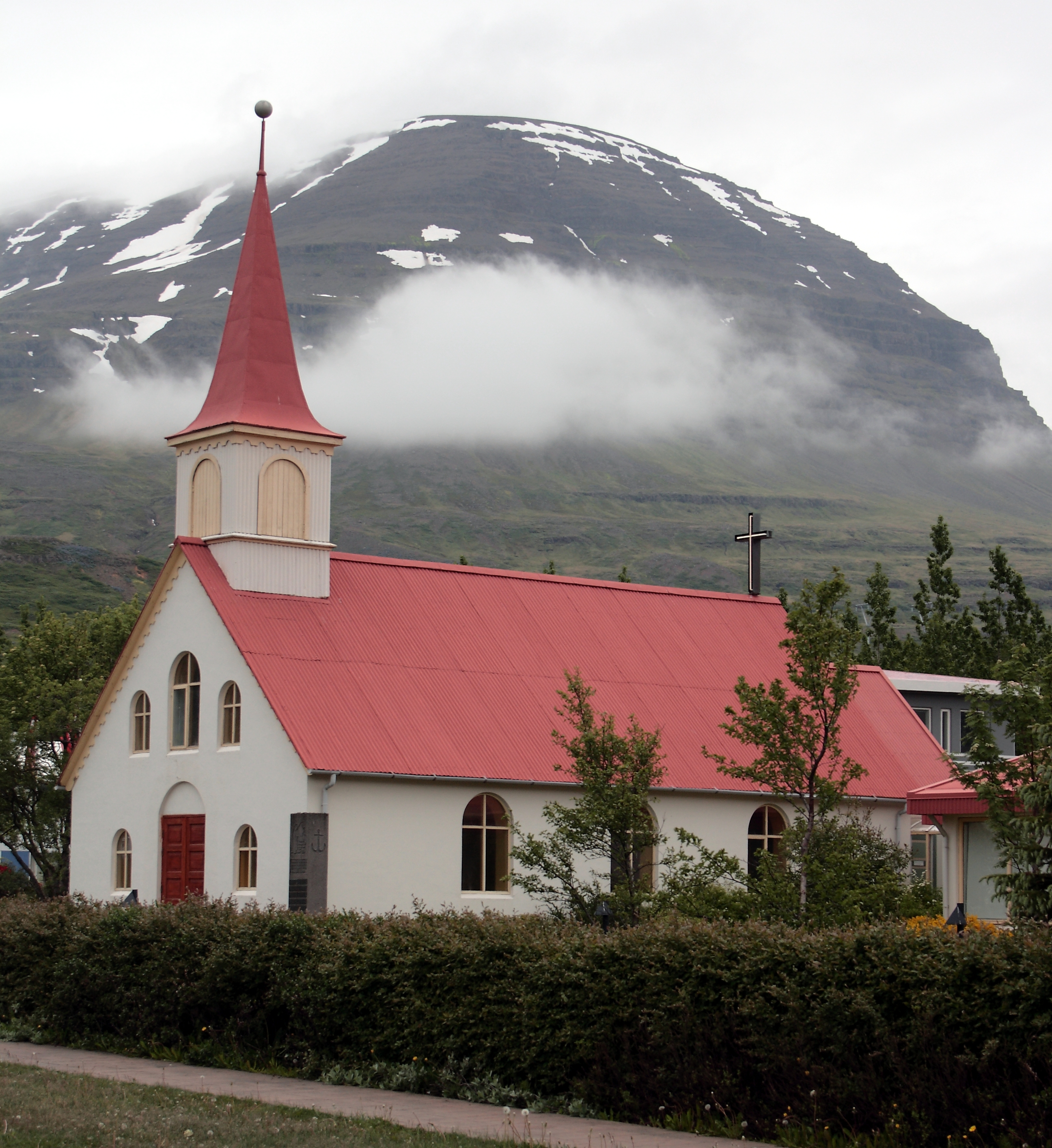 Austurland, Gemeinde Fjarðabyggð: Reyðarfjörður Reyðarfjarðarkirkja, Búðargata 1